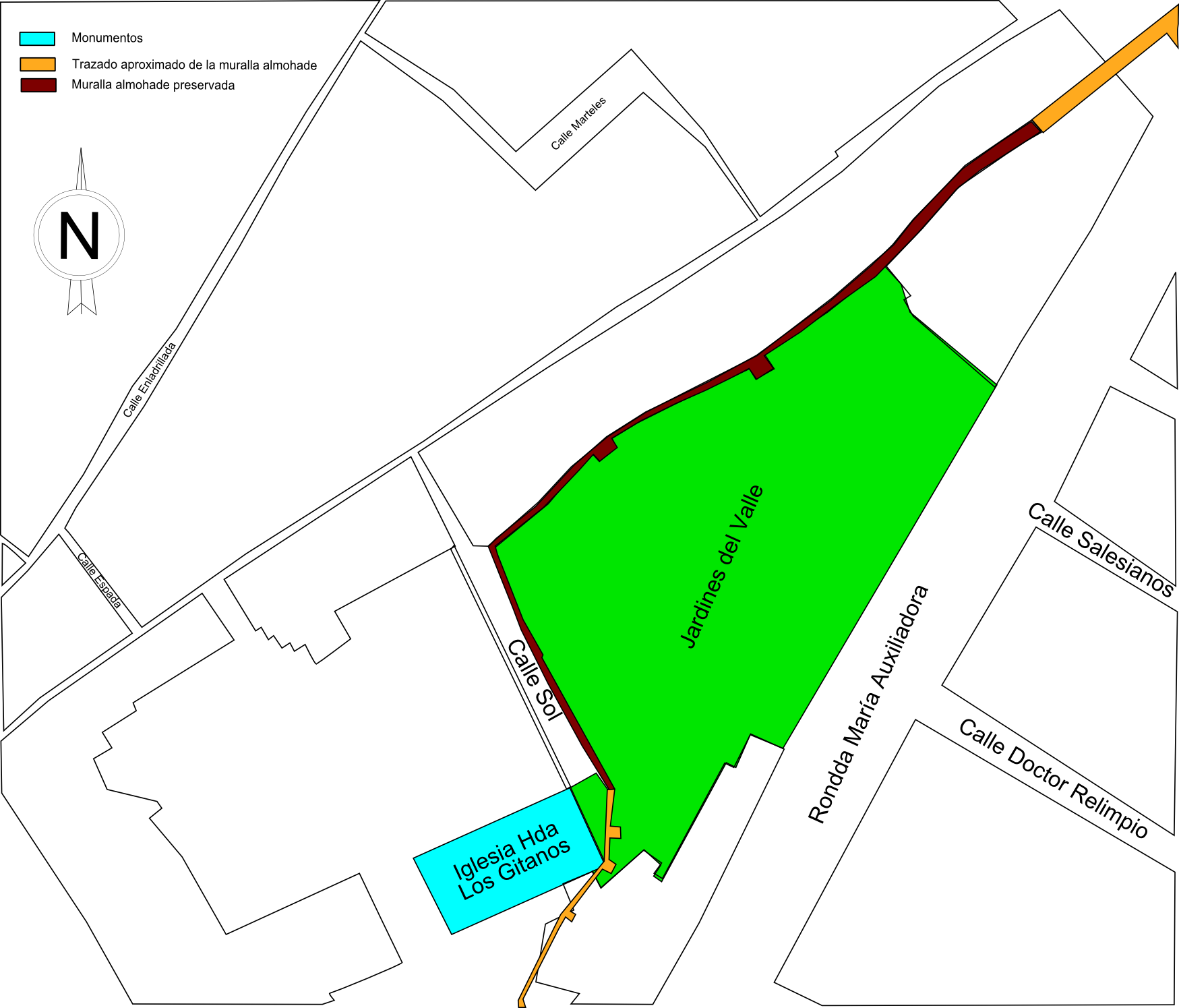 Plano del tramo de las Murallas de Sevilla preservado en los jardines del Valle realizado por mi con Inkscape